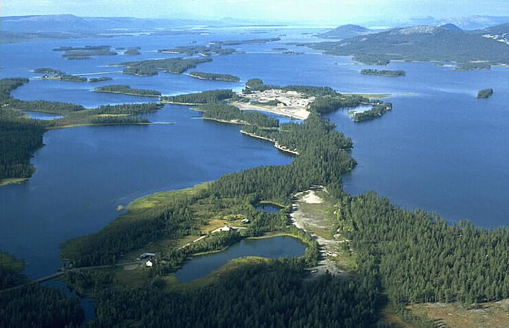 Nåtti i förgrunden. Motiv: Galtisgutj-Nåtti Nyckelord: Flygbilder, Riksintressen Kategori: Insjömiljöer Nåtti i förgrunden.